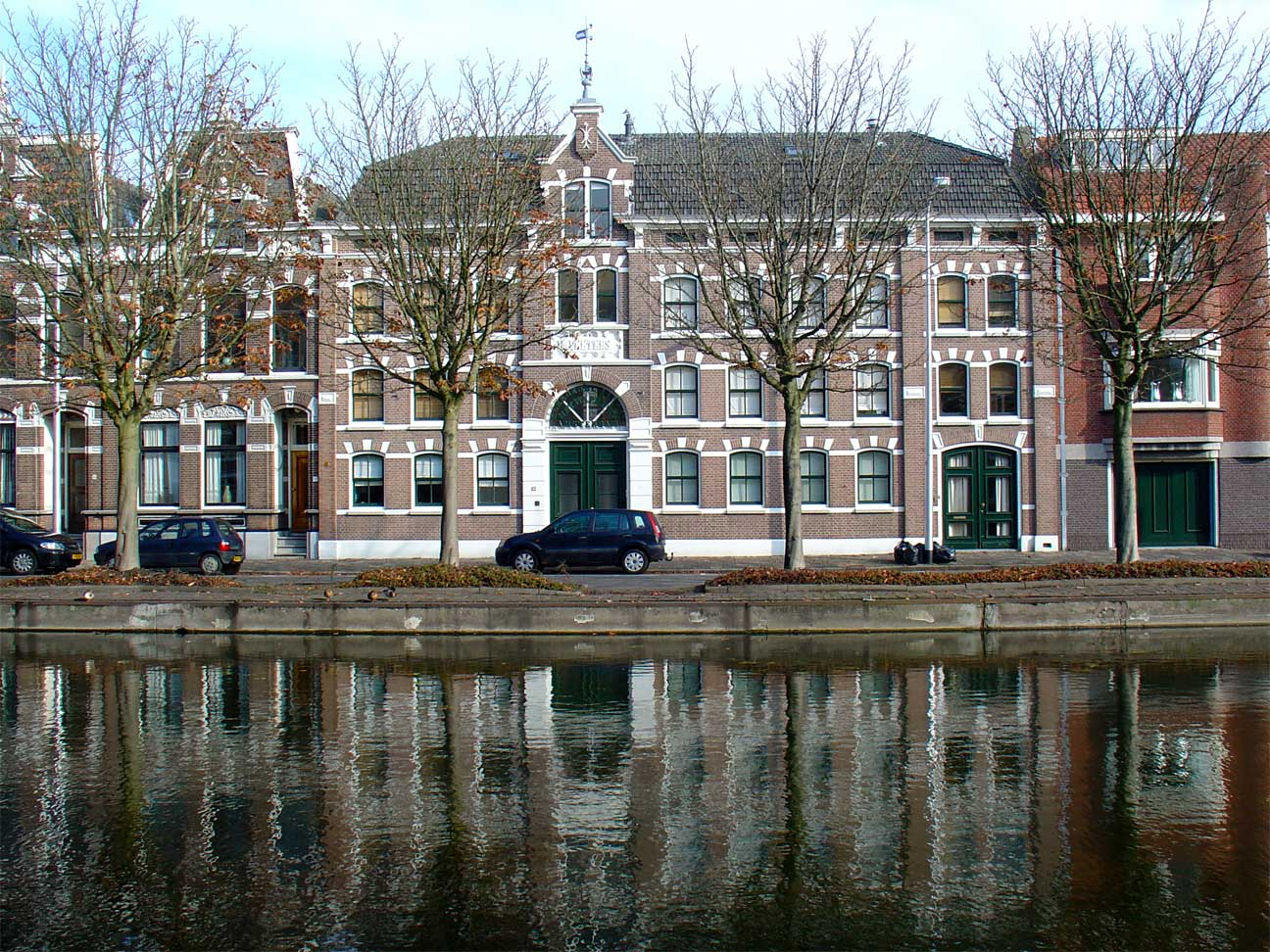 Het wapen van Amsterdam, voormalige klederblekerij annex wasserij op de Blekerssingel te Gouda